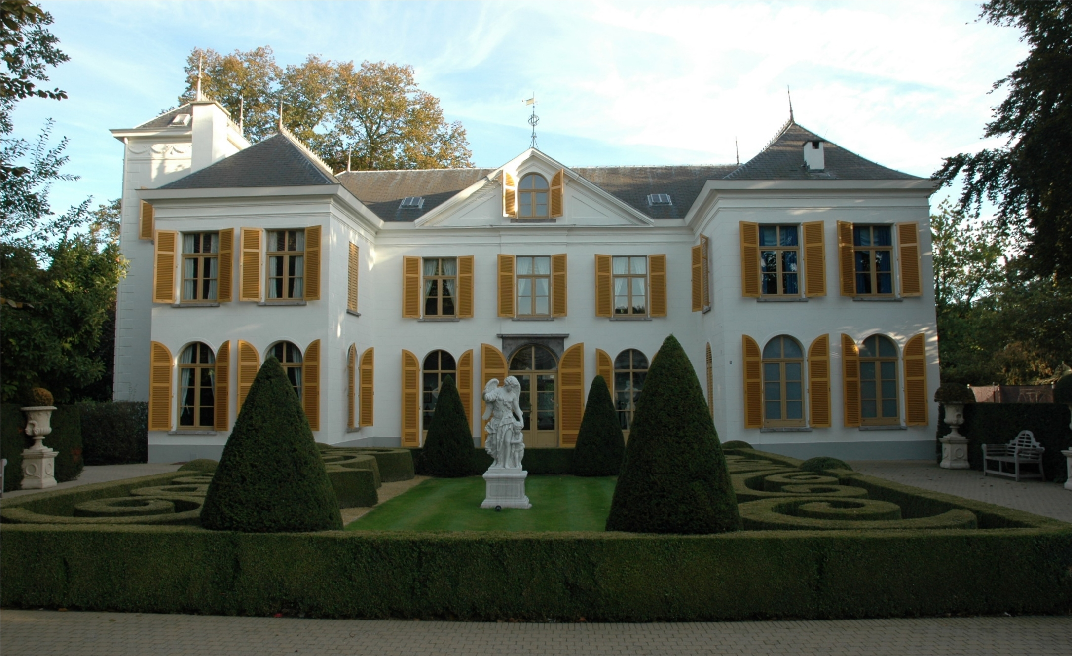 Kasteel Bosdam - Beveren-Waas - Belgium